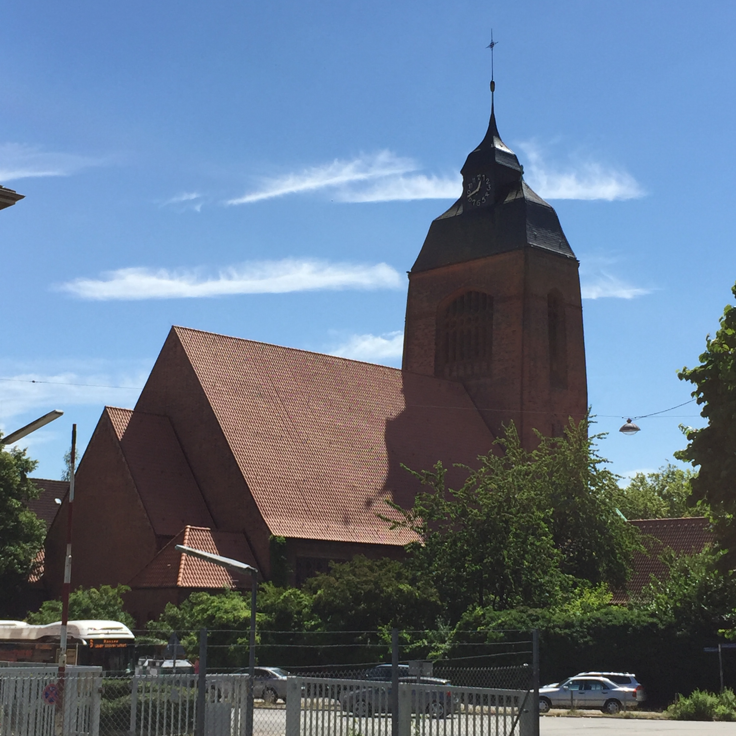 Petruskirche Kiel-Wik Rückansicht